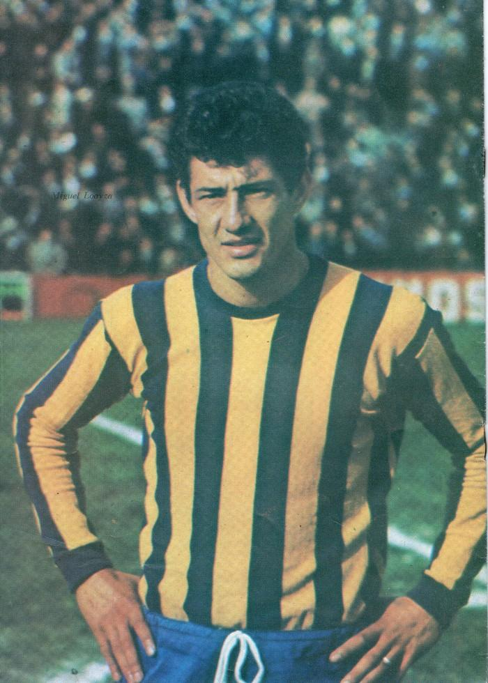 Miguel Loayza